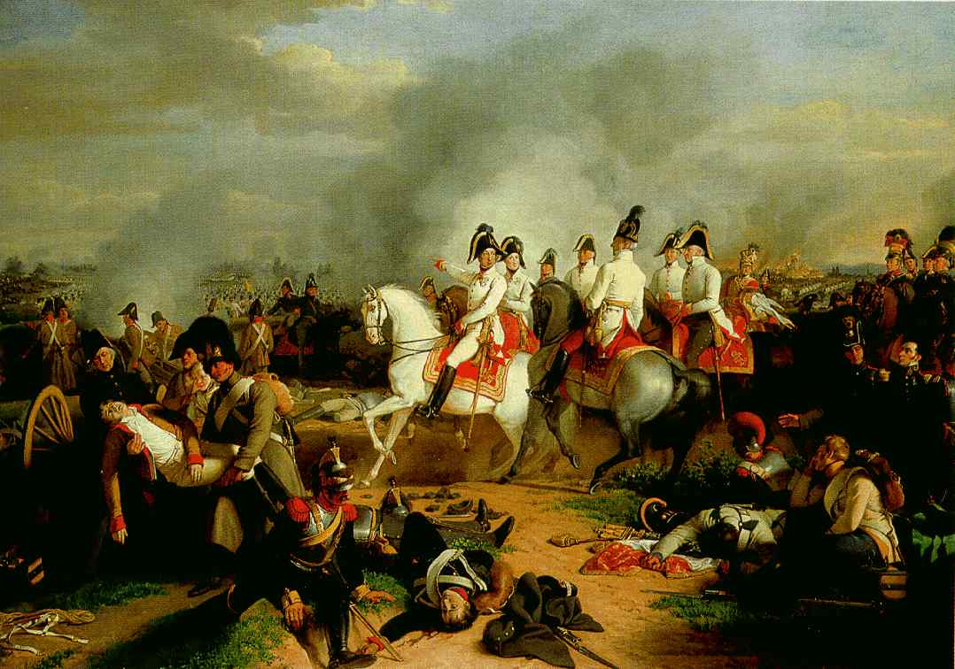 Johann Peter Krafft: Die Sieger von Aspern, 1820